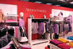 изображение магазина